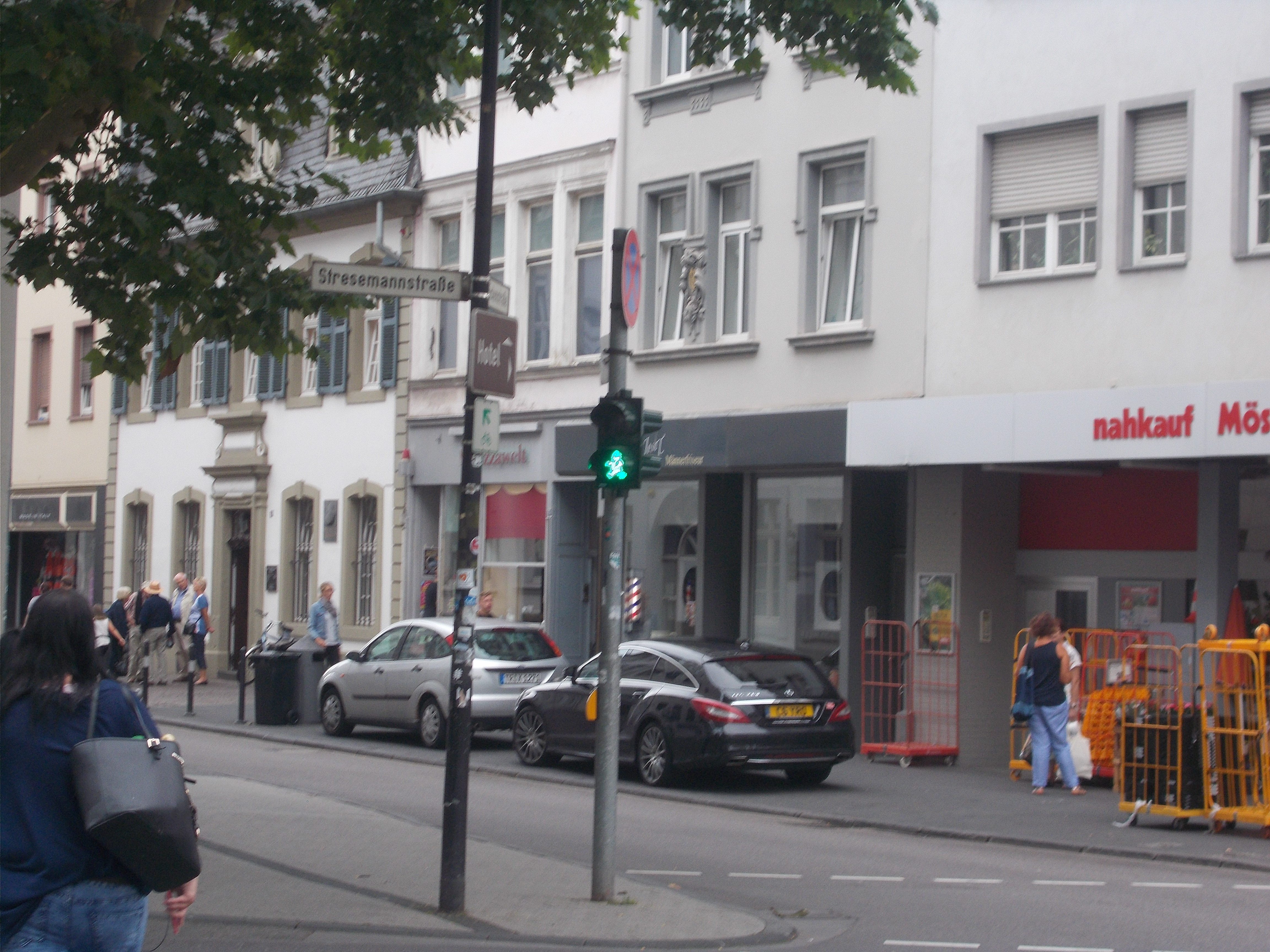 Seit 2018 gibt es in Trier am Karl-Marx-Haus und an der Karl-Marx-Statue Ampelmännchen, die an Karl Marx erinnern.